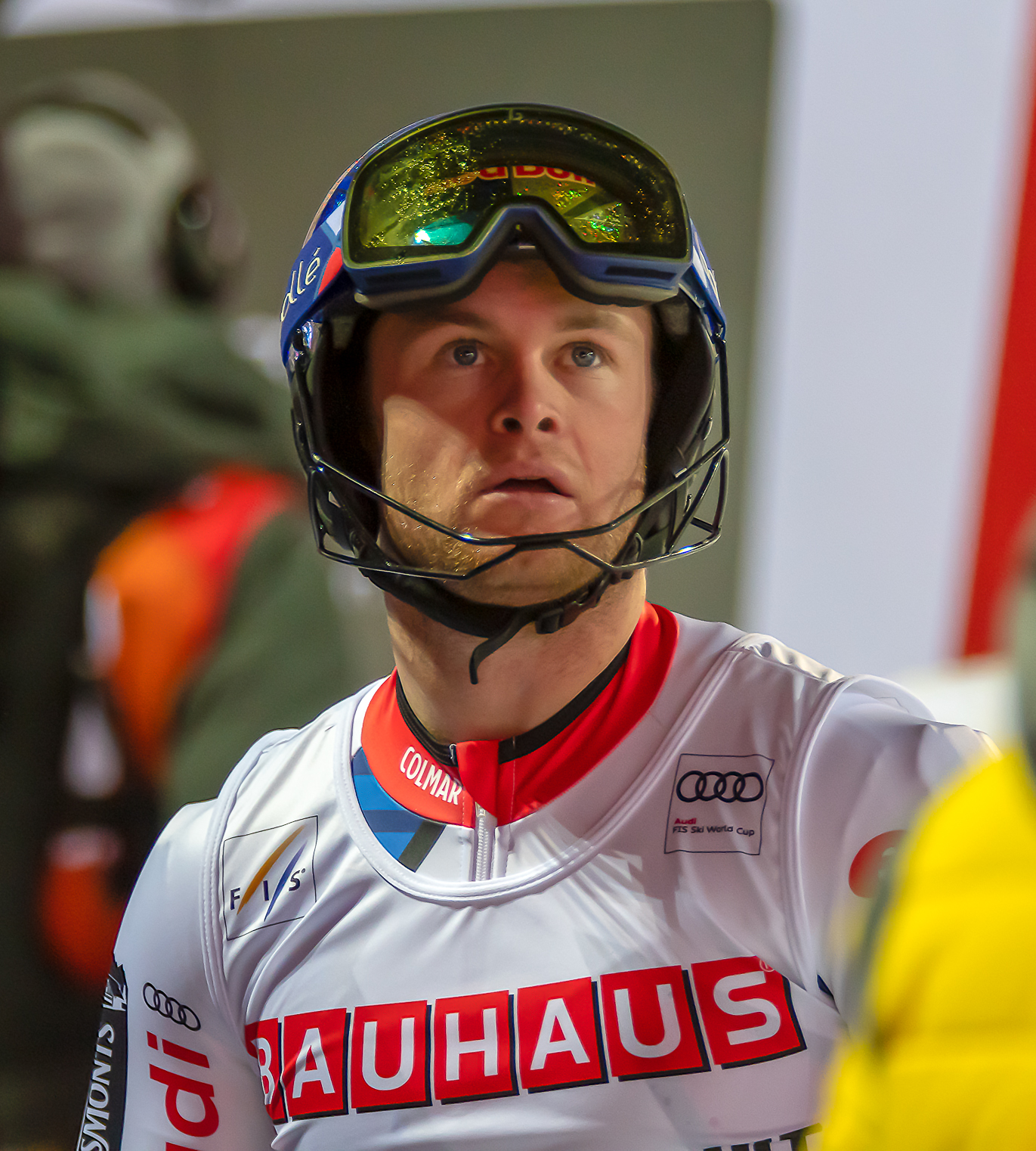 FIS Alpine Skiing World Cup in Stockholm 2019